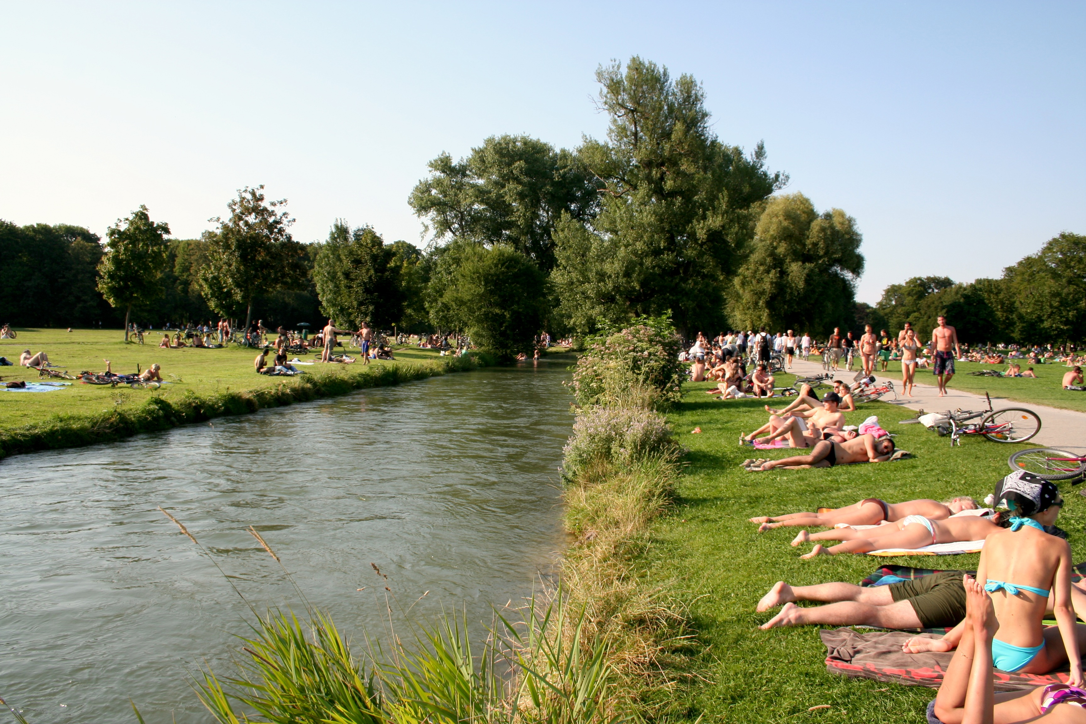 Schwabinger Bach im Südteil des Englischen Gartens